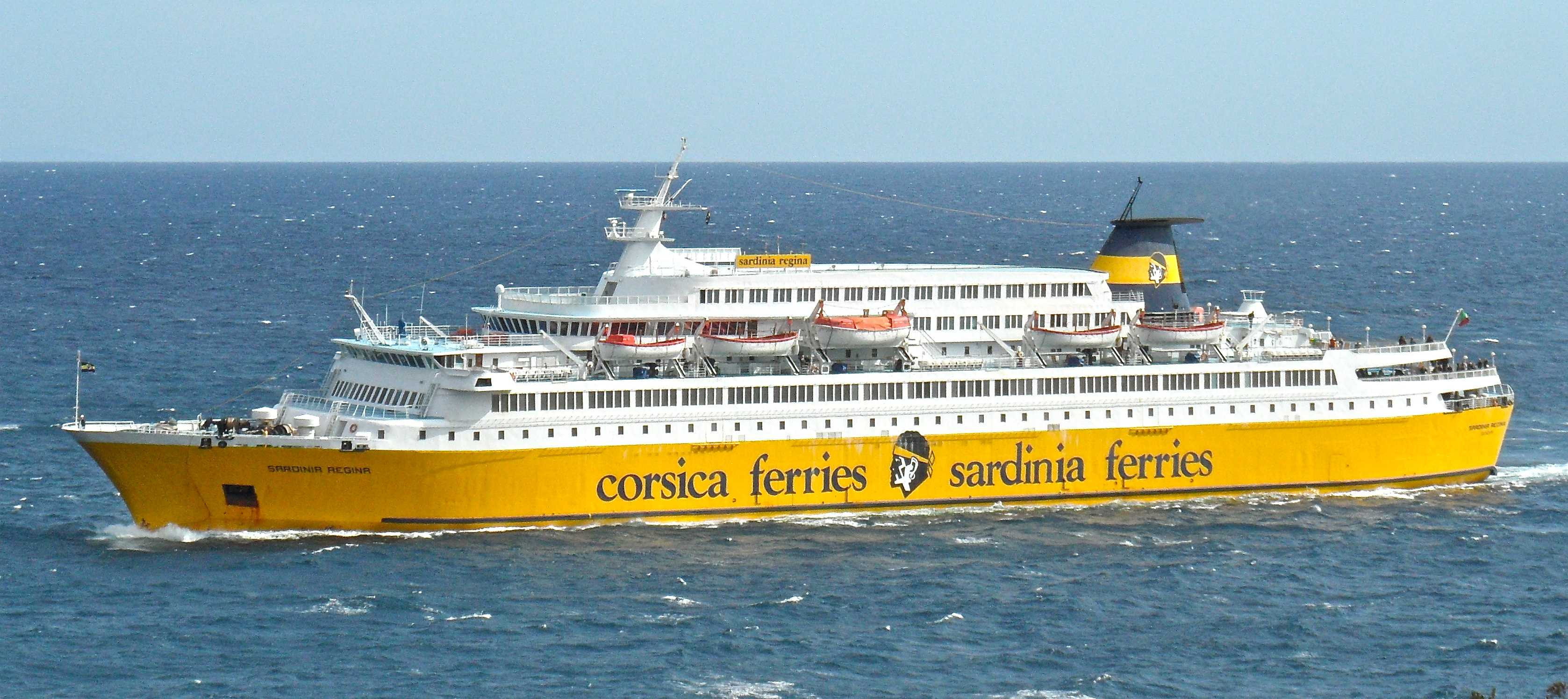 Mise en service : 1986 Longueur : 146,5 mètres Largeur : 20,8 mètres Vitesse : 18 noeuds (env 33 km/h) Puissance : 14400 ch Capacité passagers : 1700 personnes Capacité véhicules : 450 voitures Lignes : Bastia Savone et Bastia Livourne